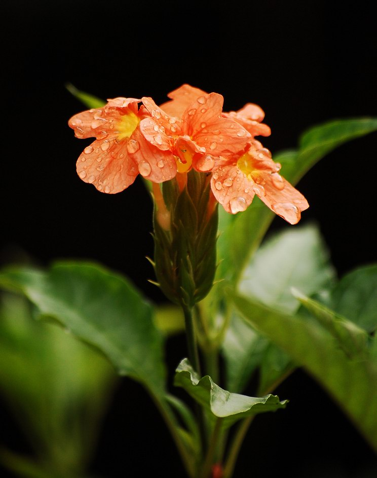 കനകാംബരം (Crossandra infundibuliformis)